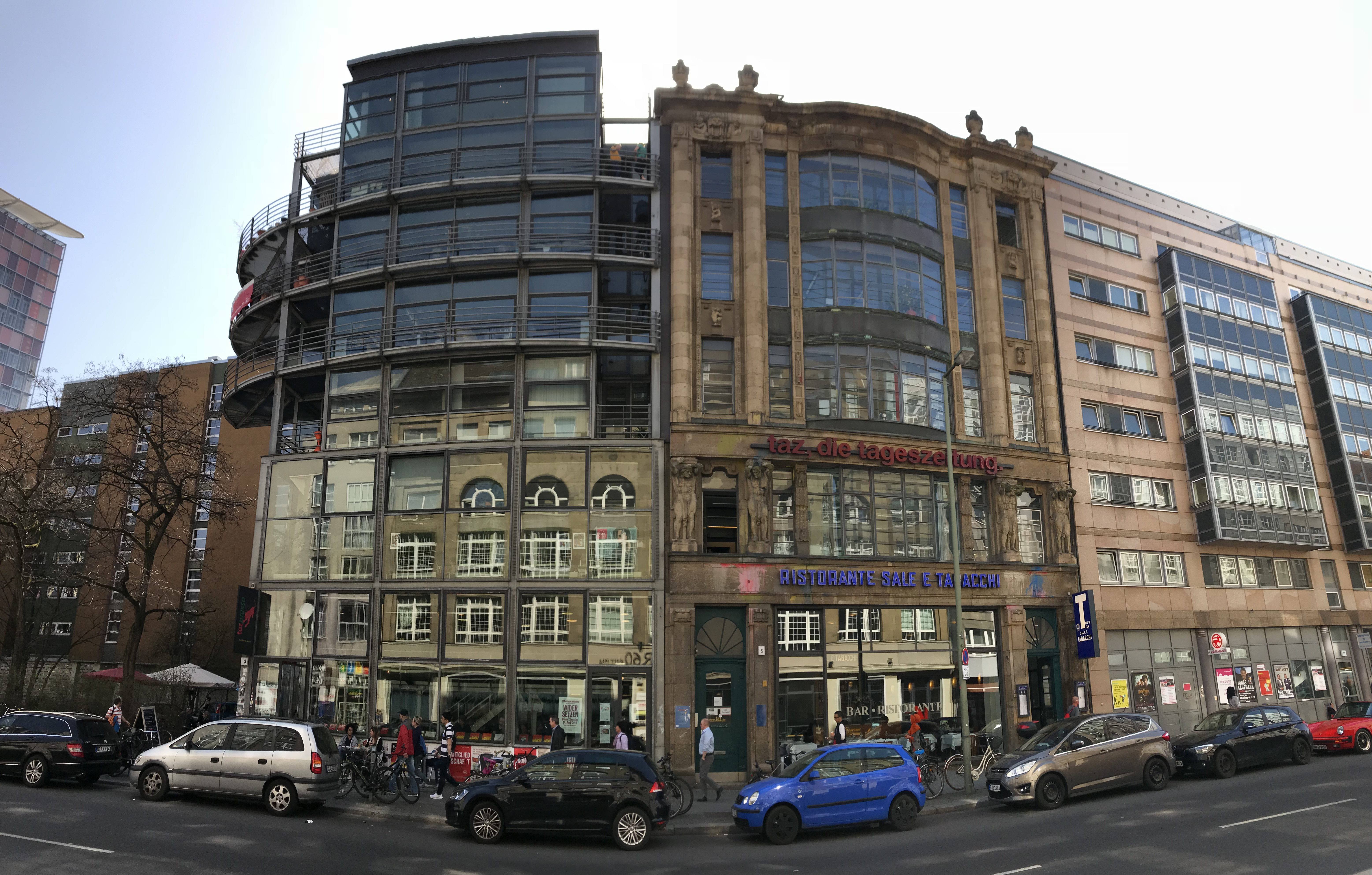 Das neue betahaus in Kreuzberg